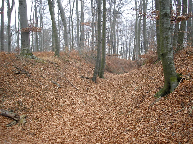 Frühmittelalterlicher Burgstall Purk (Gemeinde Moorenweis, Landkreis Fürstenfeldbruck, Oberbayern). Blick in den südlichen Wallgraben. Eigene Aufnahme, Jan. 2008 / Early Middle Ages castle Purk near Moorenweis, Upper Bavaria, Germany. Looking into the southern moat. Own photo, Jan. 2008